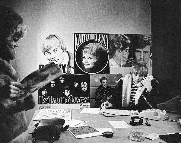 Katri Helena ja Danny D-tuotannon toimistossa Helsingin Korkeavuorenkadulla 1968.